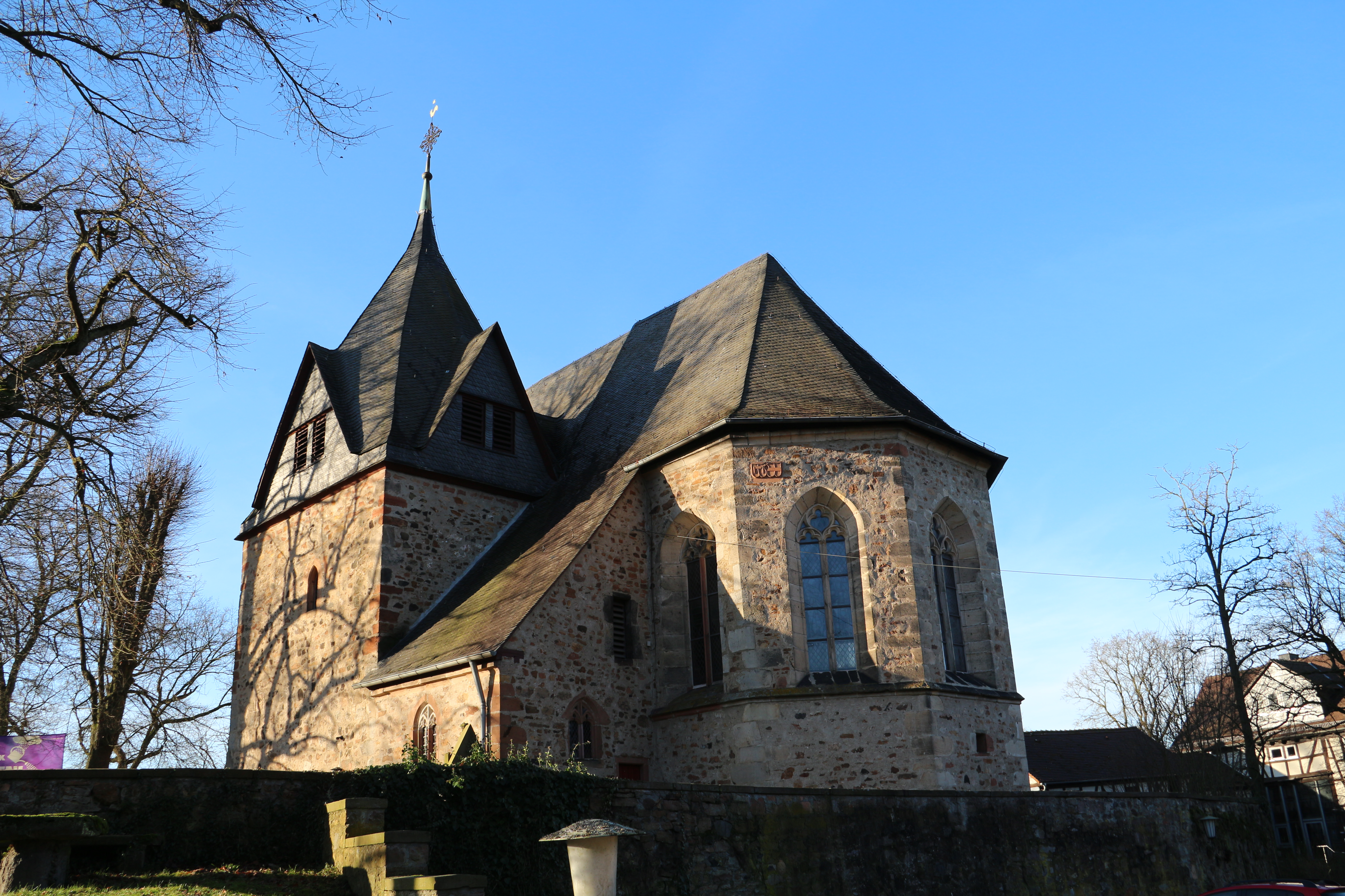 Evangelische Kirche Kirchberg (Lahn)